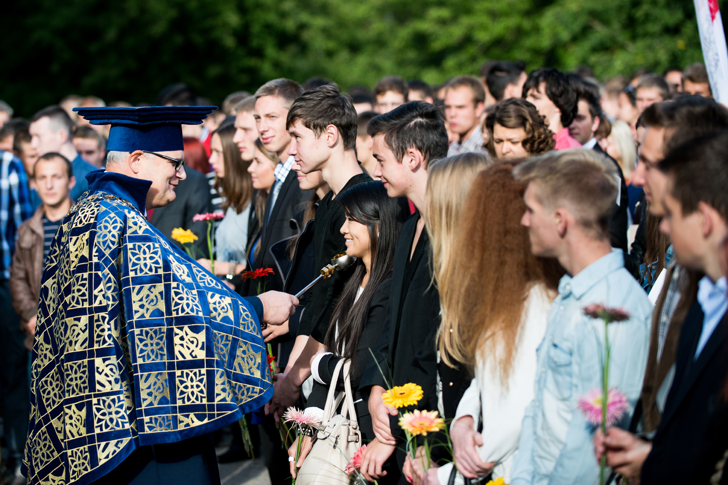 VGTU rektorius